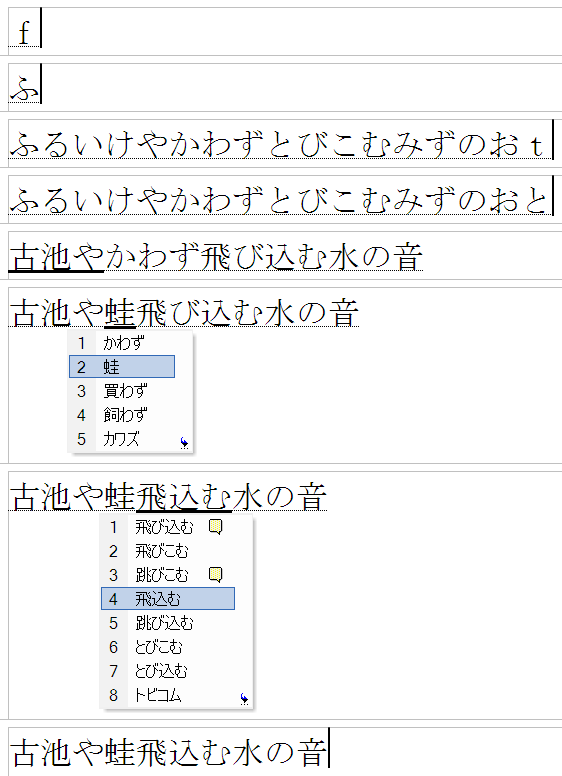 IME demonstratie. Gemaakt met .